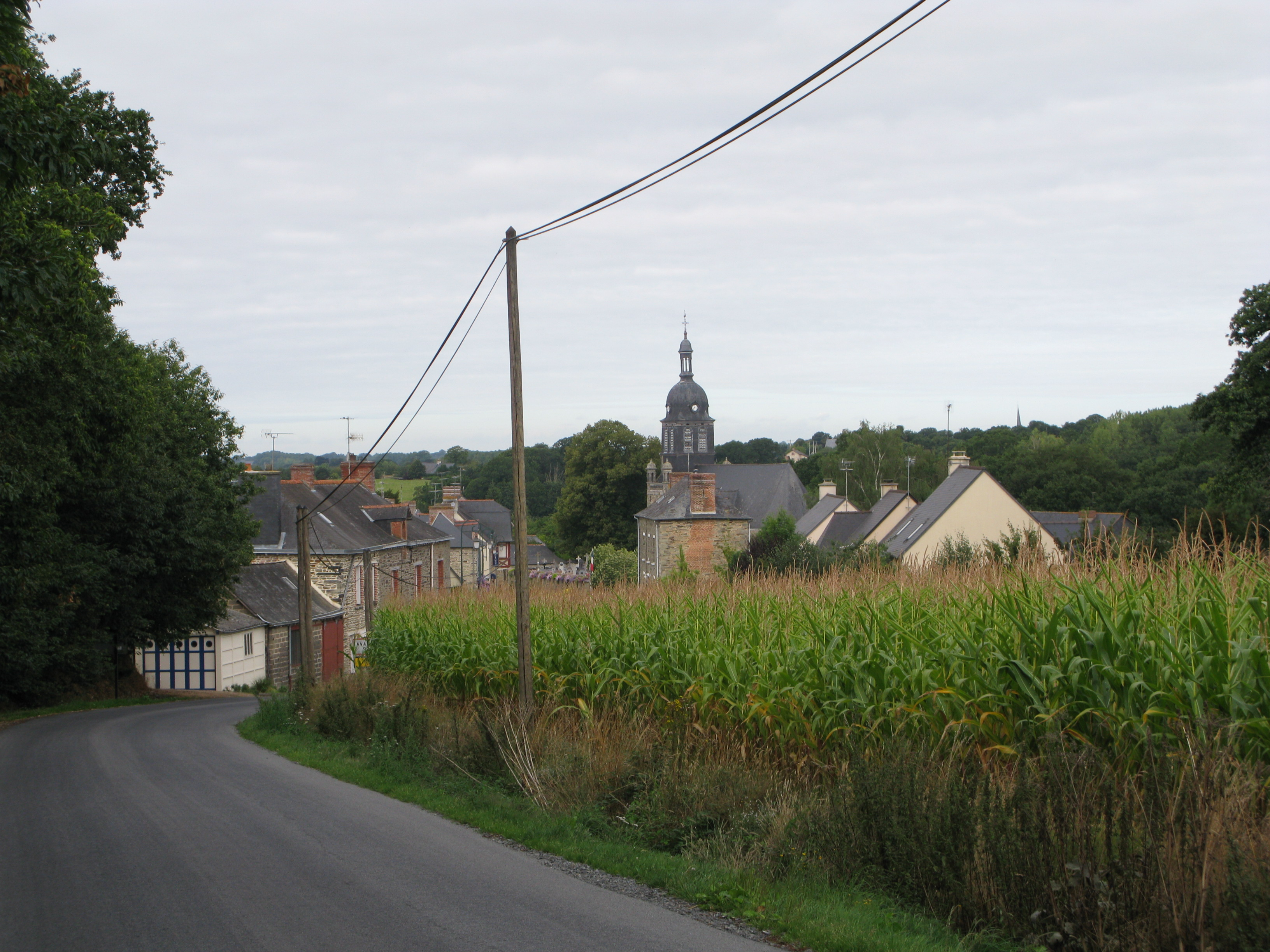 Vue générale sur Availles-sur-Seiche